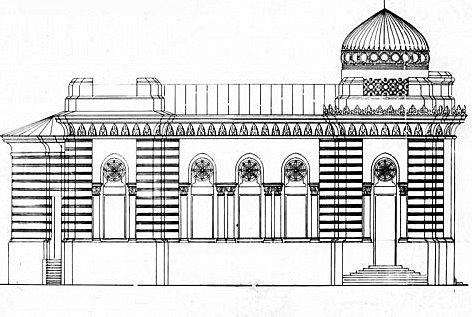 Караимская кенасса в Киеве